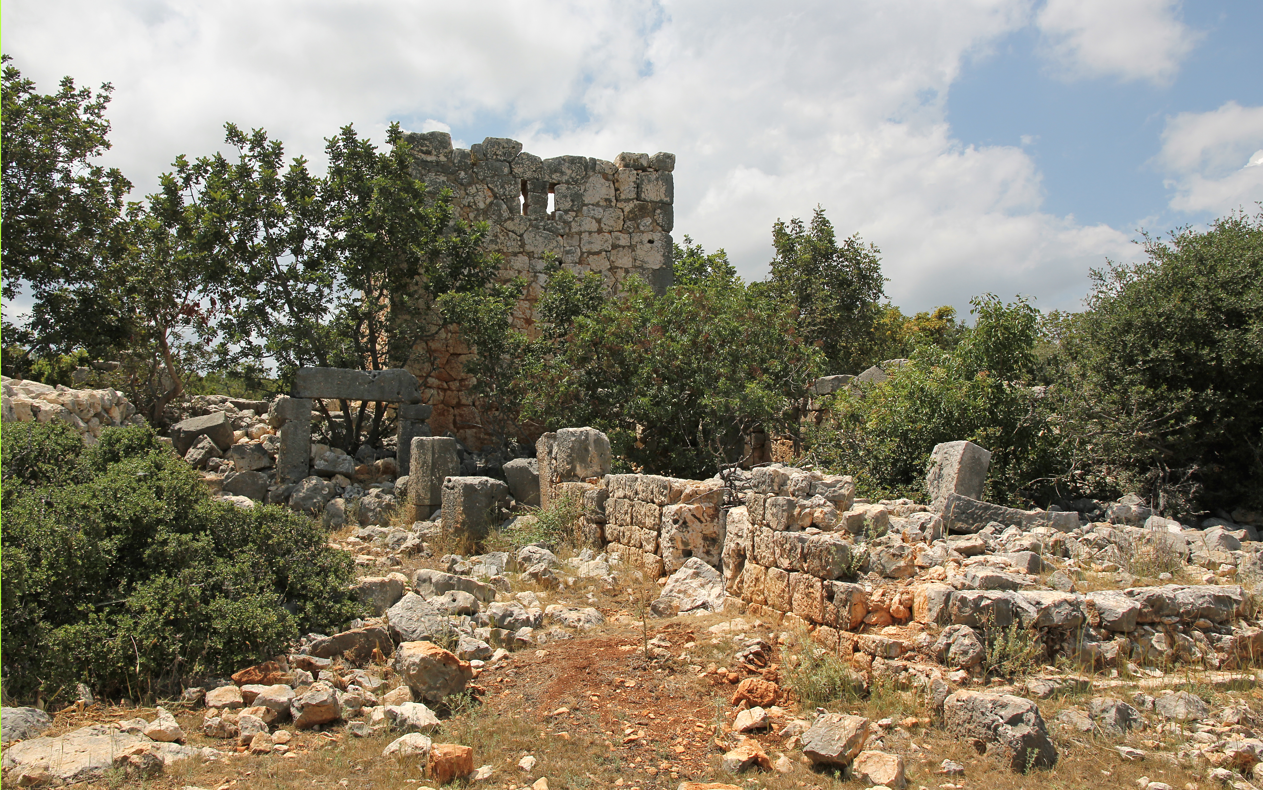 Gücük, hellenistischer Turm mit Gehöft im Rauhen Kilikien, Südtürkei